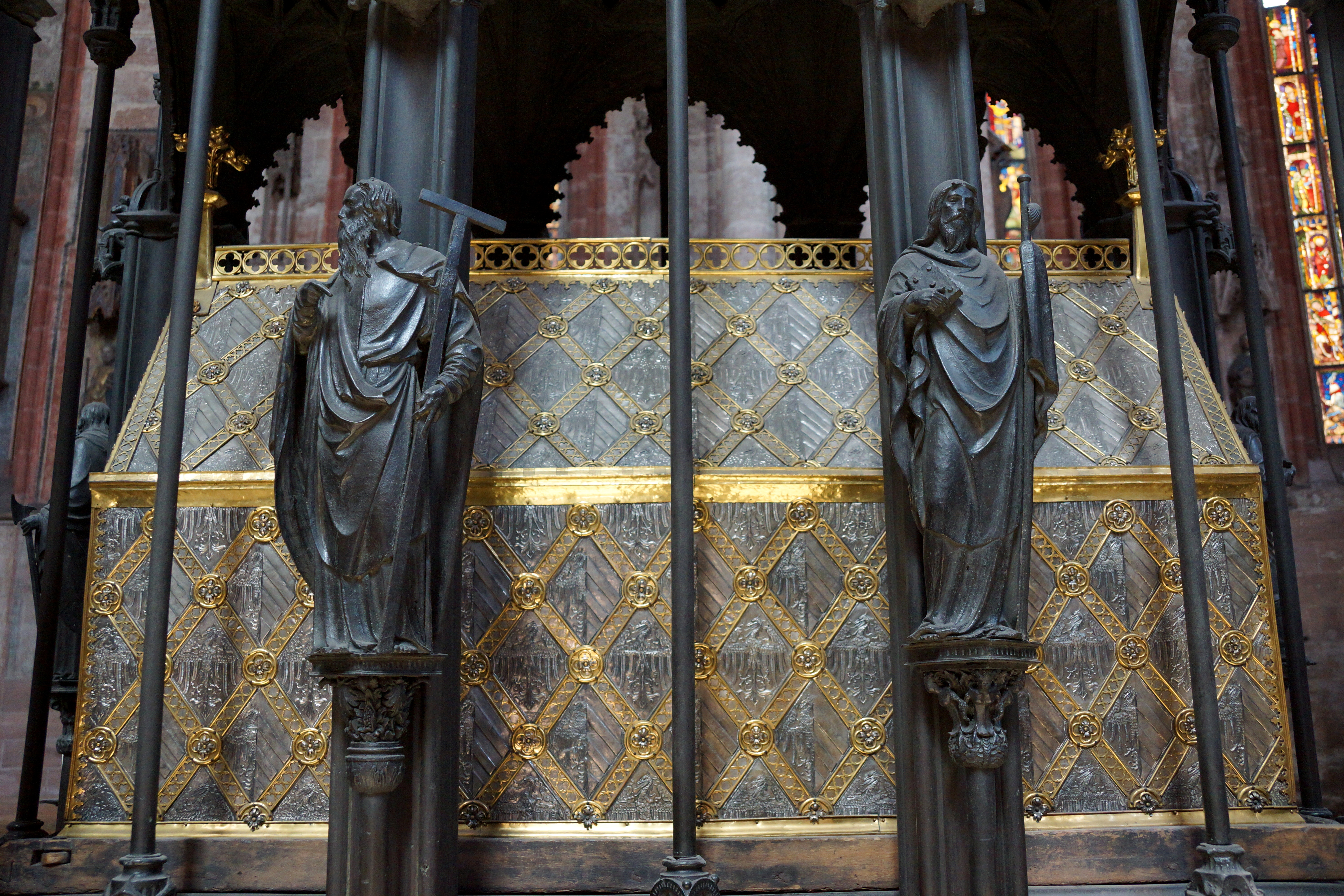 Die Sebaldus-Kirche in Nürnberg